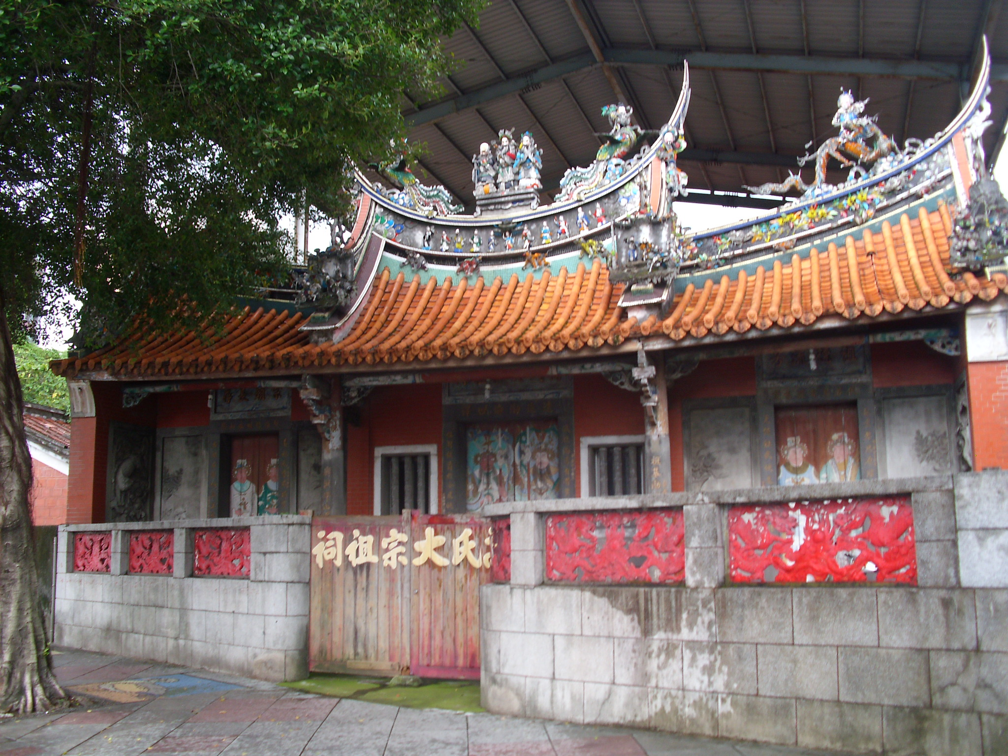 Bân-lâm-gú: 臺北艋舺高氏大宗祖祠，原本是學海書院。